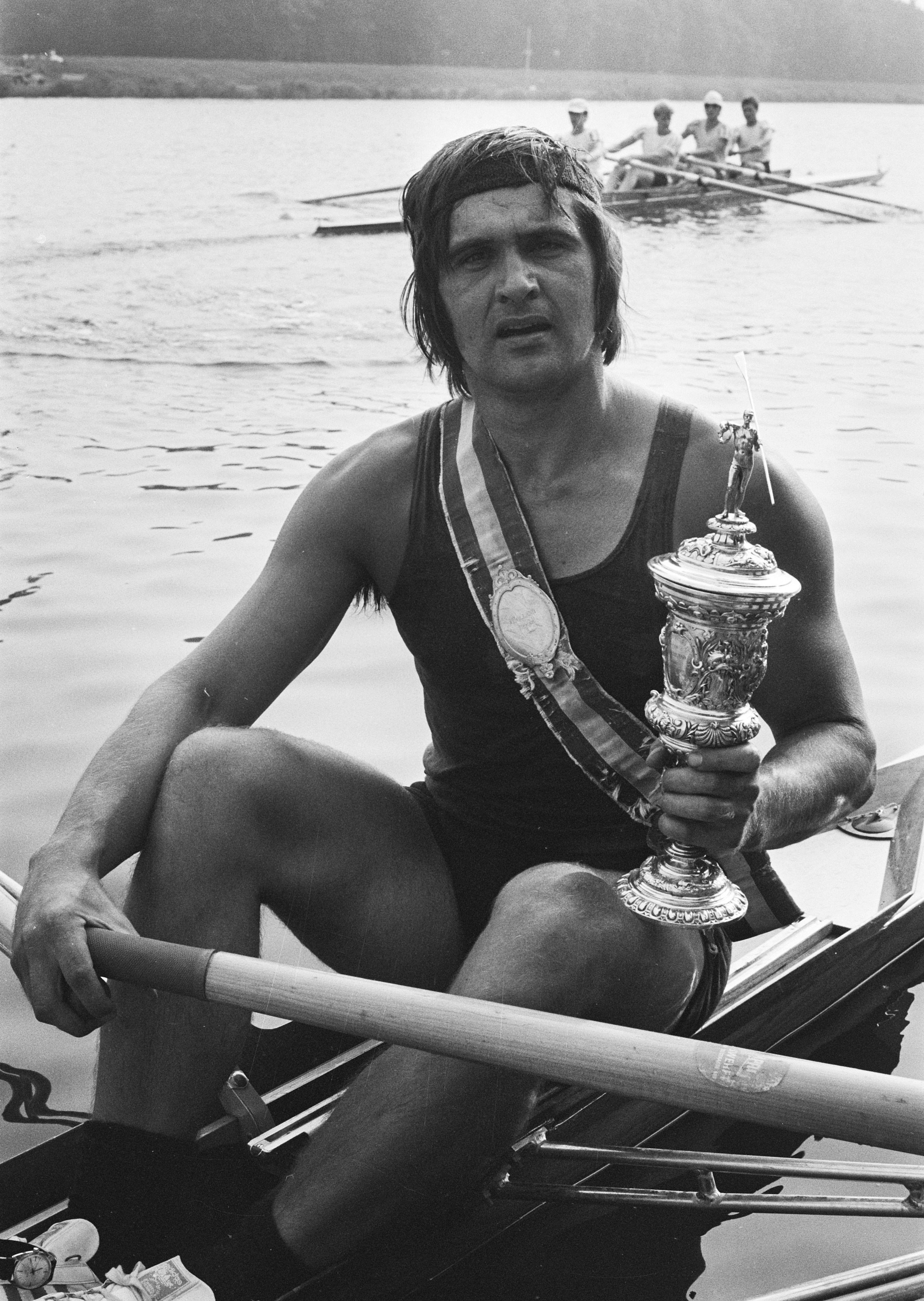 Roeien: Holland Beker op Bosbaan, winnaar Sean Drea